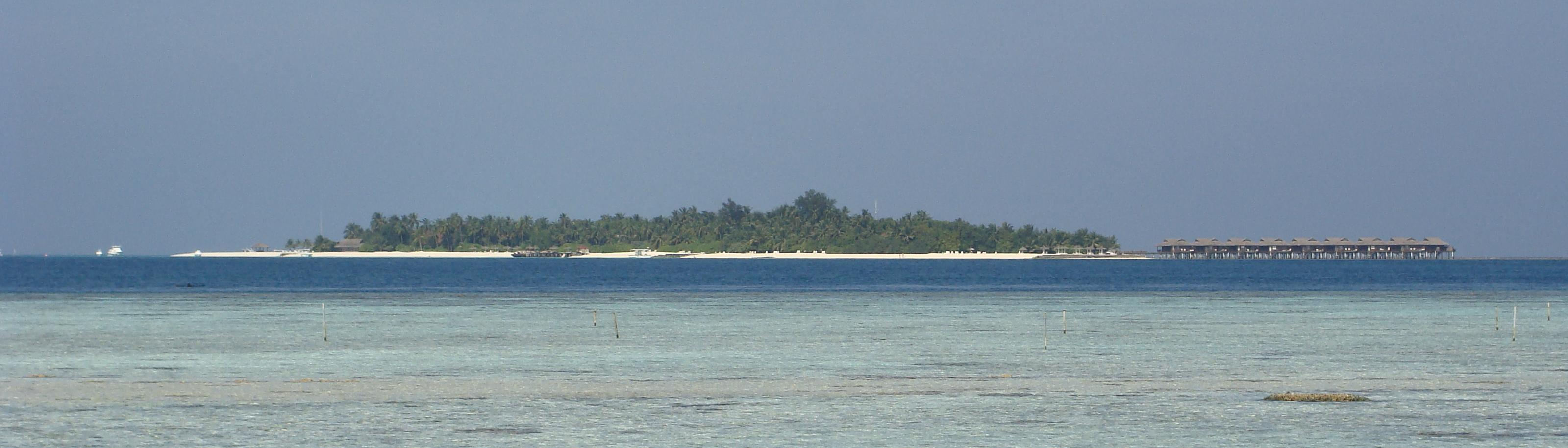 Velassaru from Vaadhoo